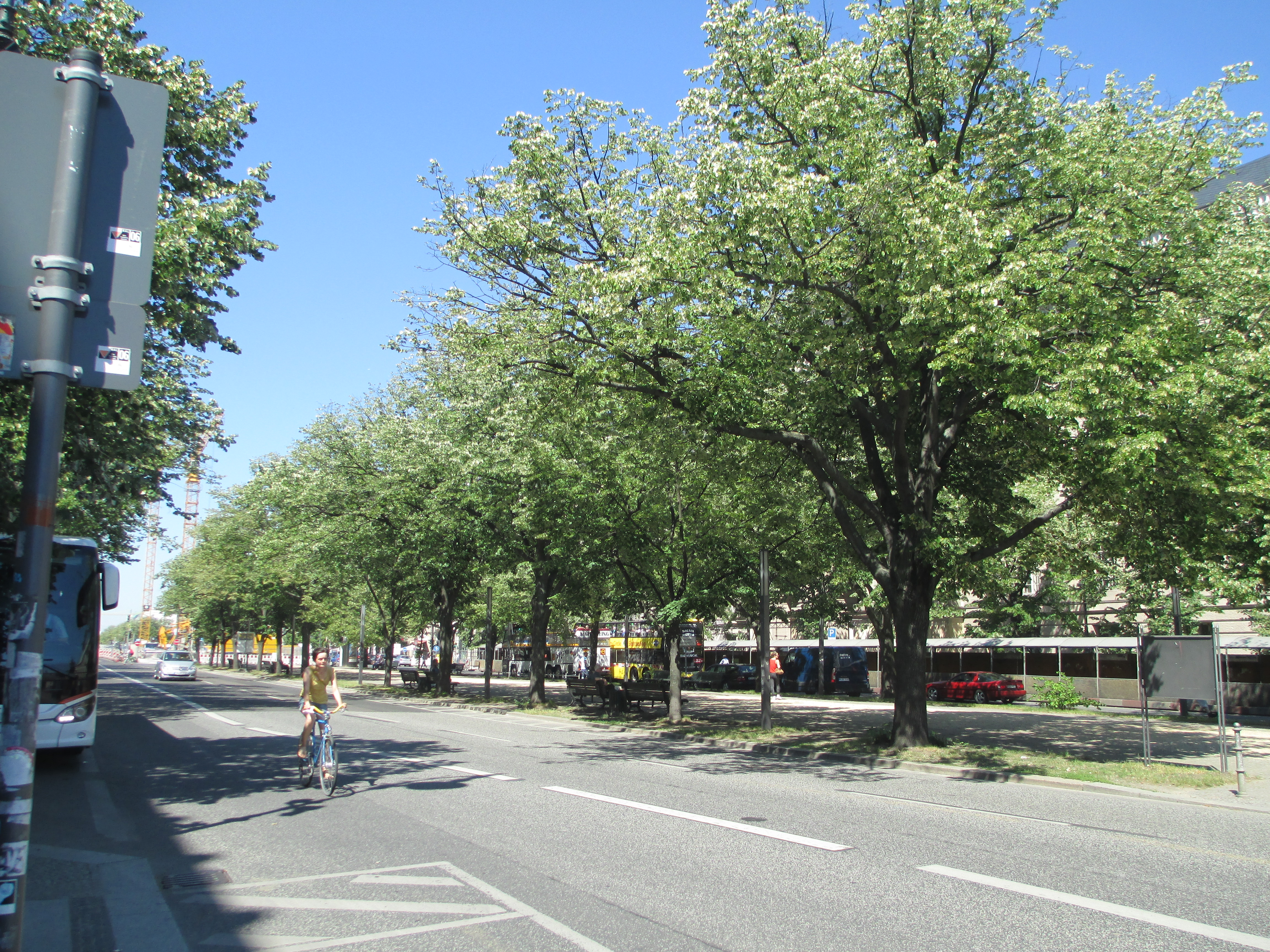 שדרת אונטר דן לינדן בברלין